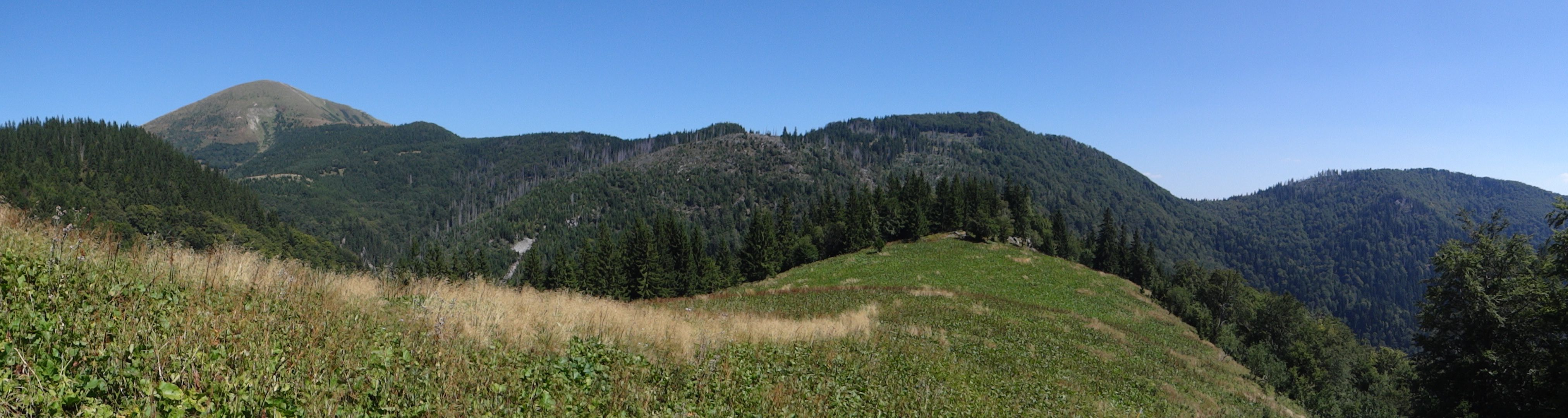 Południowy grzbiet Stoha z Žobrákiem